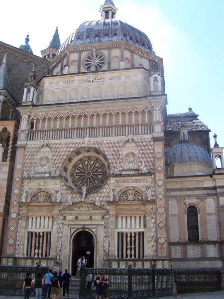 Bergamo - Cappella Colleoni